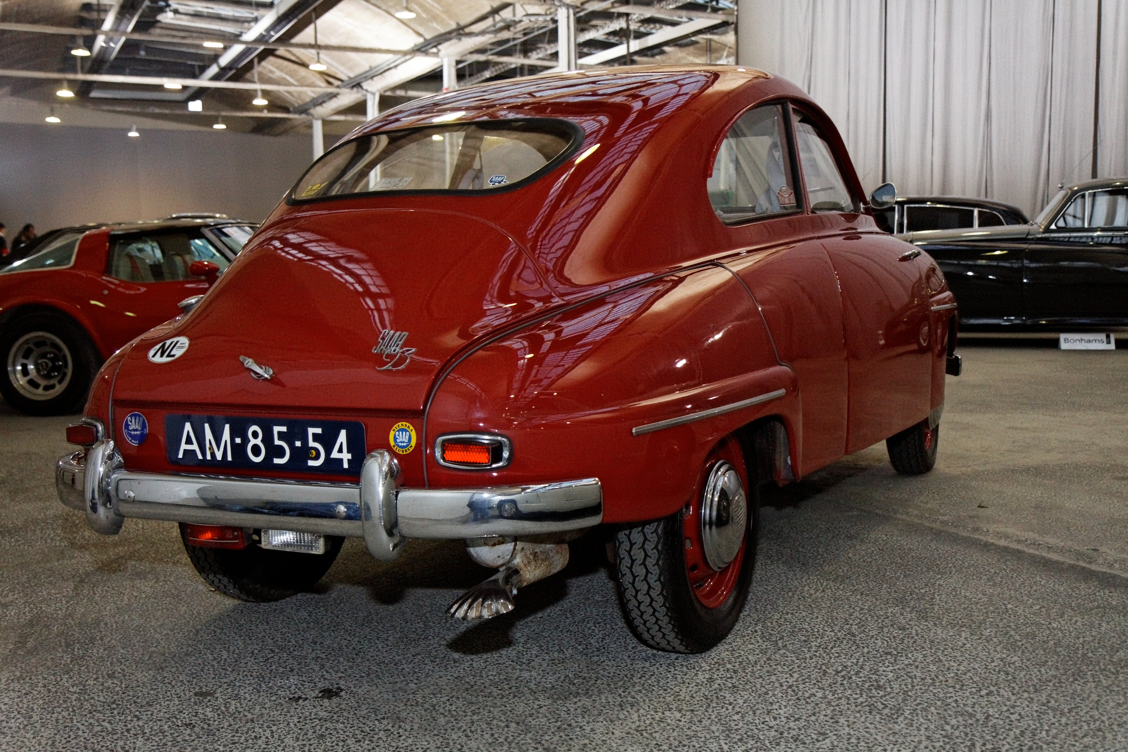 SAAB 93B De Luxe Saloon